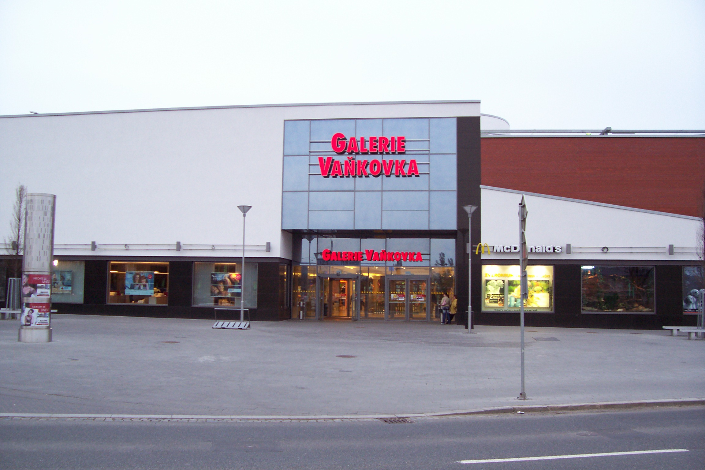 Západní vstup do Vaňkovky.